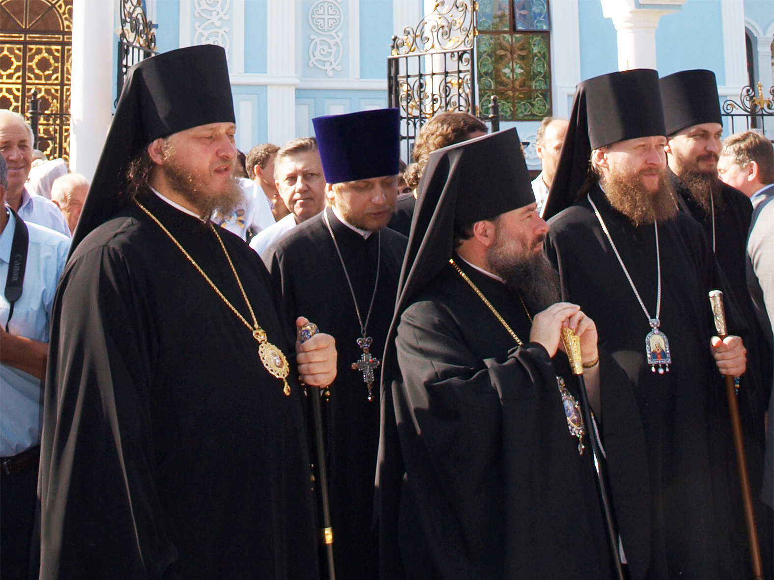 Єпископ Сєвєродонецький Никодим Барановський, архієпископ Луганський та Алчевський Митрофан Юрчук, єпископ Ровенківський Пантелеймон Поворознюк